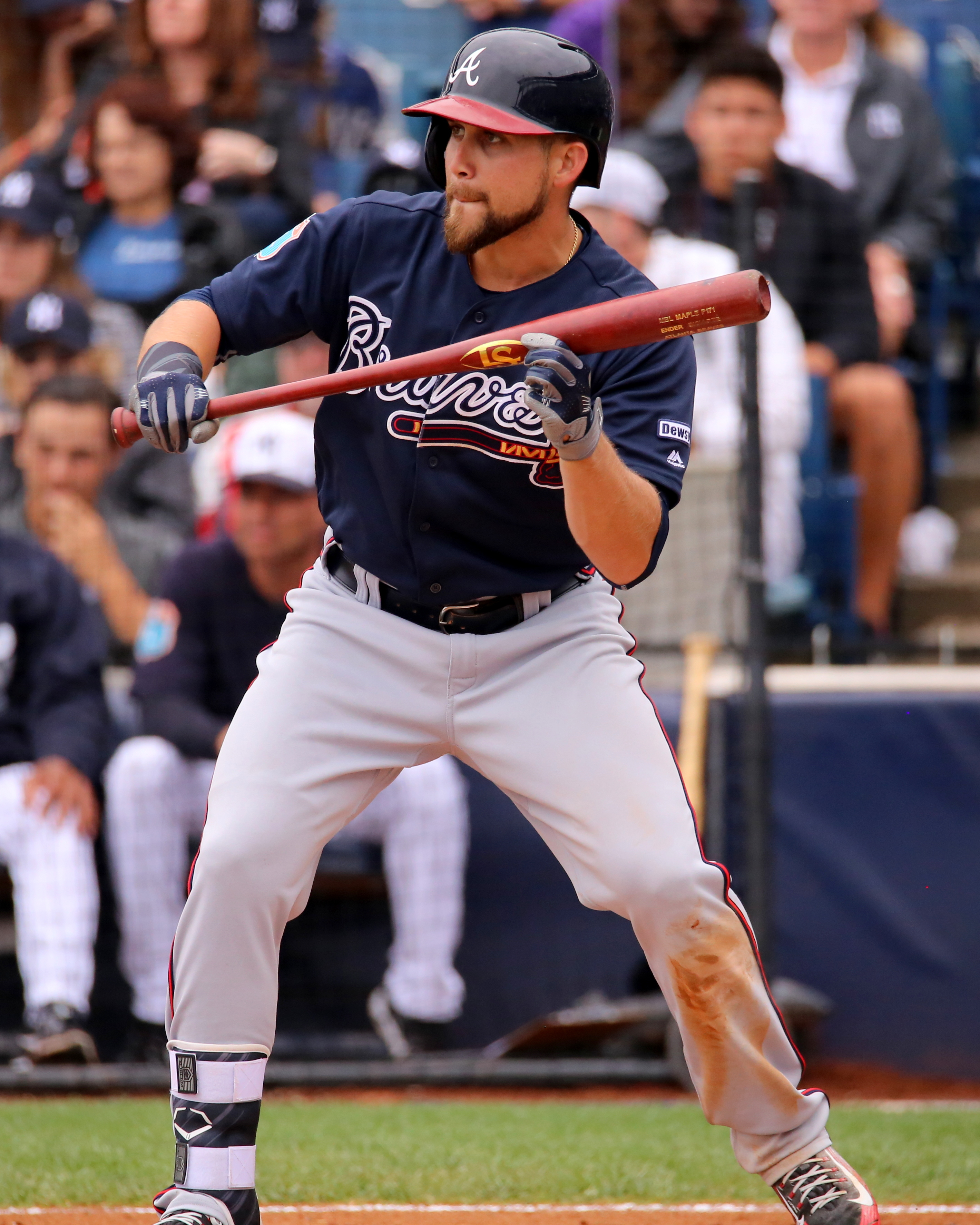 Ender Inciarte